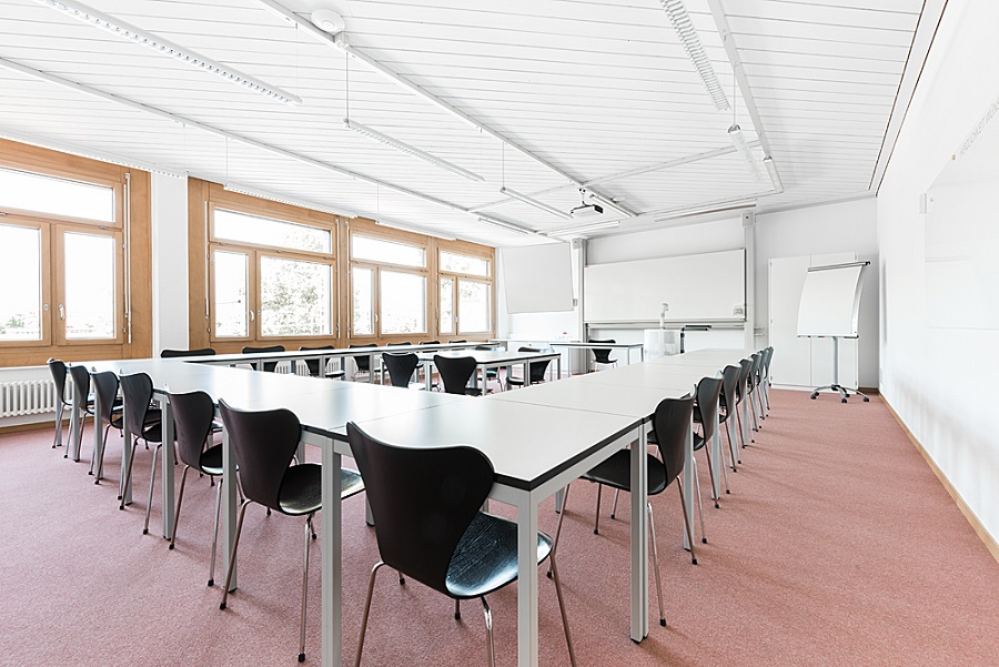 Die Klassenzimmer lassen sich variabel bestuhlen und sind mit Beamer & Leinwand, Visualizer, W-LAN, Flipchart und Whiteboard ausgestattet.